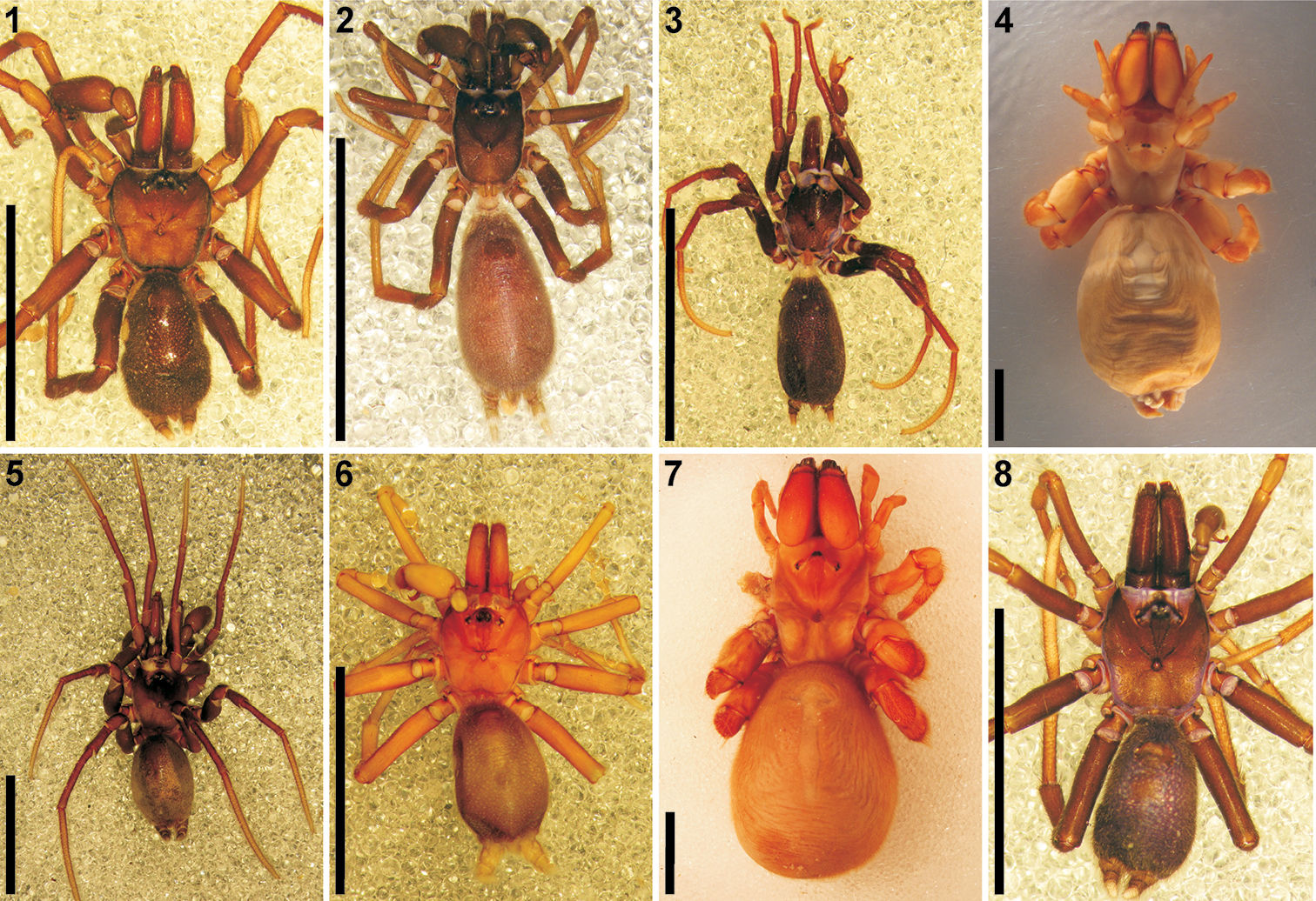 Dorsal habitus of Afrotropical Calommata species 1 Calommata megae sp. n., male (Harare, Zimbabwe) 2 Calommata meridionalis sp. n., male (Erfenis Dam, South Africa) 3 Calommata namibica sp. n., male (Etosha, Namibia) 4 Calommata simoni Pocock, female (Galim, Cameroon) 5 Calommata simoni, male (Dja Reserve, Cameroon) 6 Calommata tibialis sp. n., male (Bassari–Sokodé, Togo) 7 Calommata transvaalica Hewitt, female (Blouberg, South Africa) 8 Calommata transvaalica, male (Groenkloof, South Africa). Scale bars: 5mm.